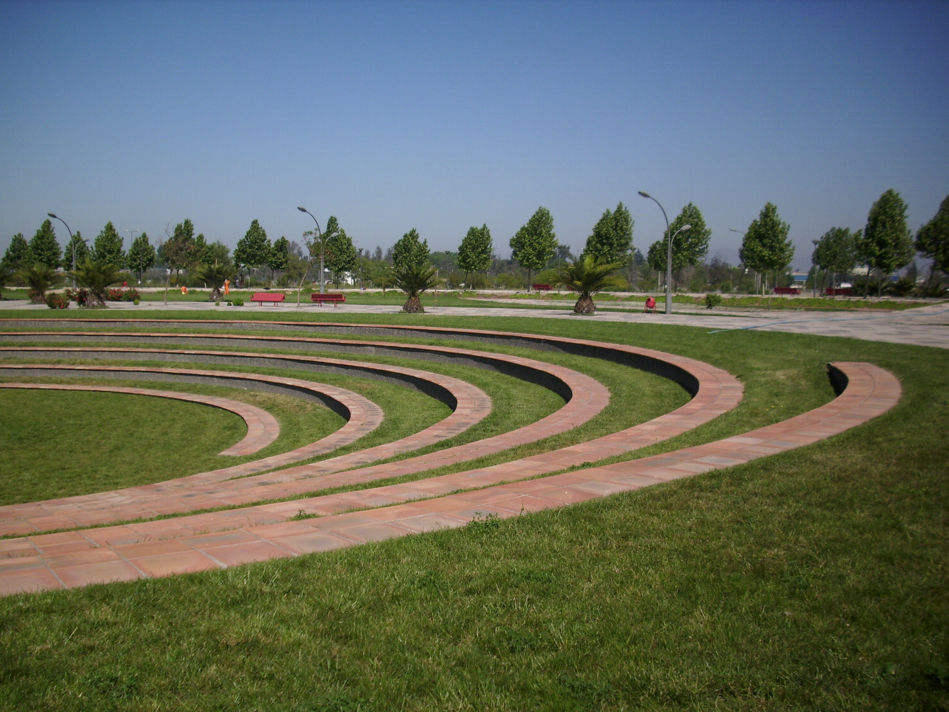 El anfiteatro con forma de espiral dentro del Parque Portal Bicentenario, en la comuna de Cerrillos, Santiago de Chile.